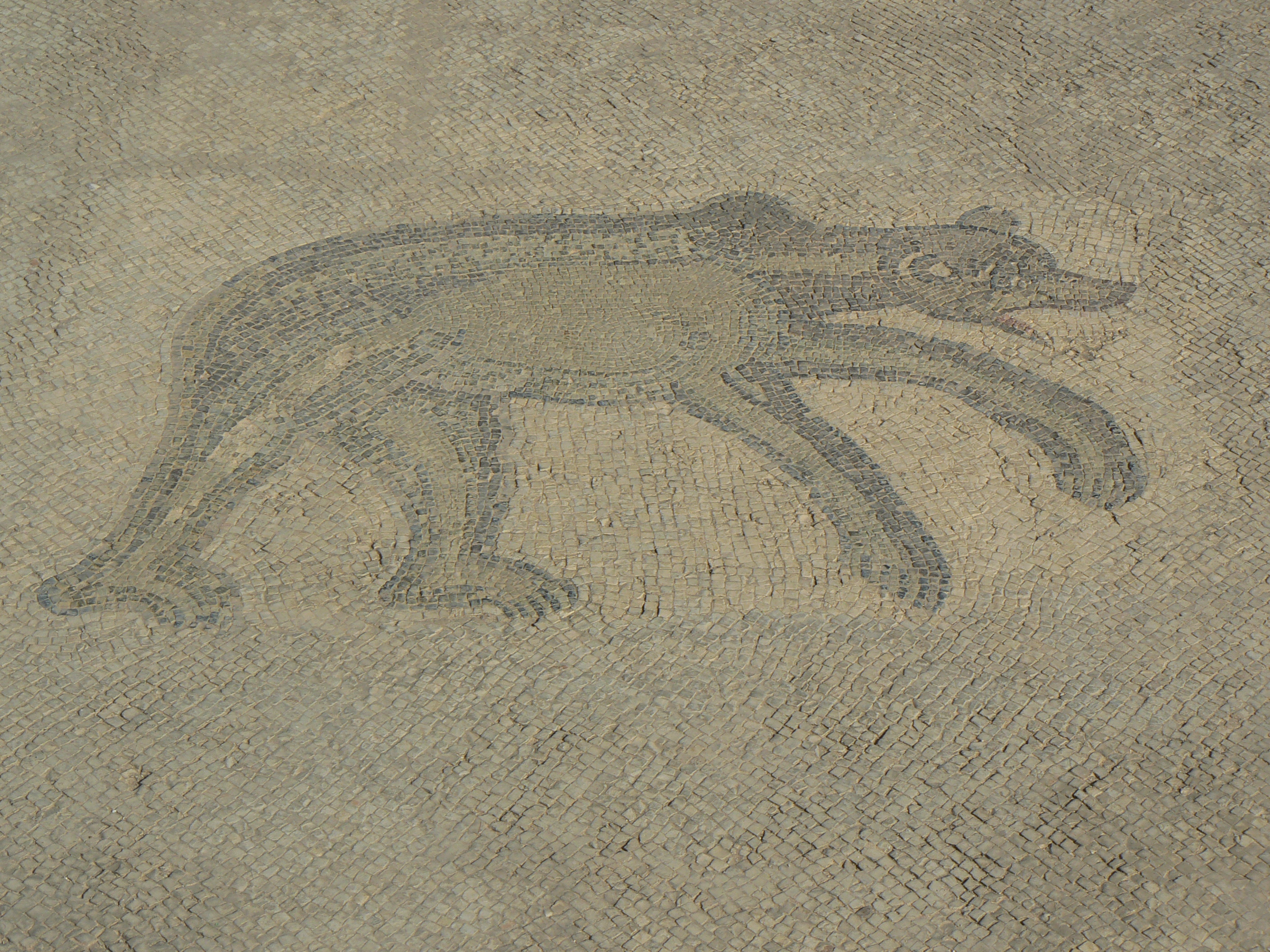 Mosaique tardive dite de l'ours, théâtre de Bulla regia, Tunisie